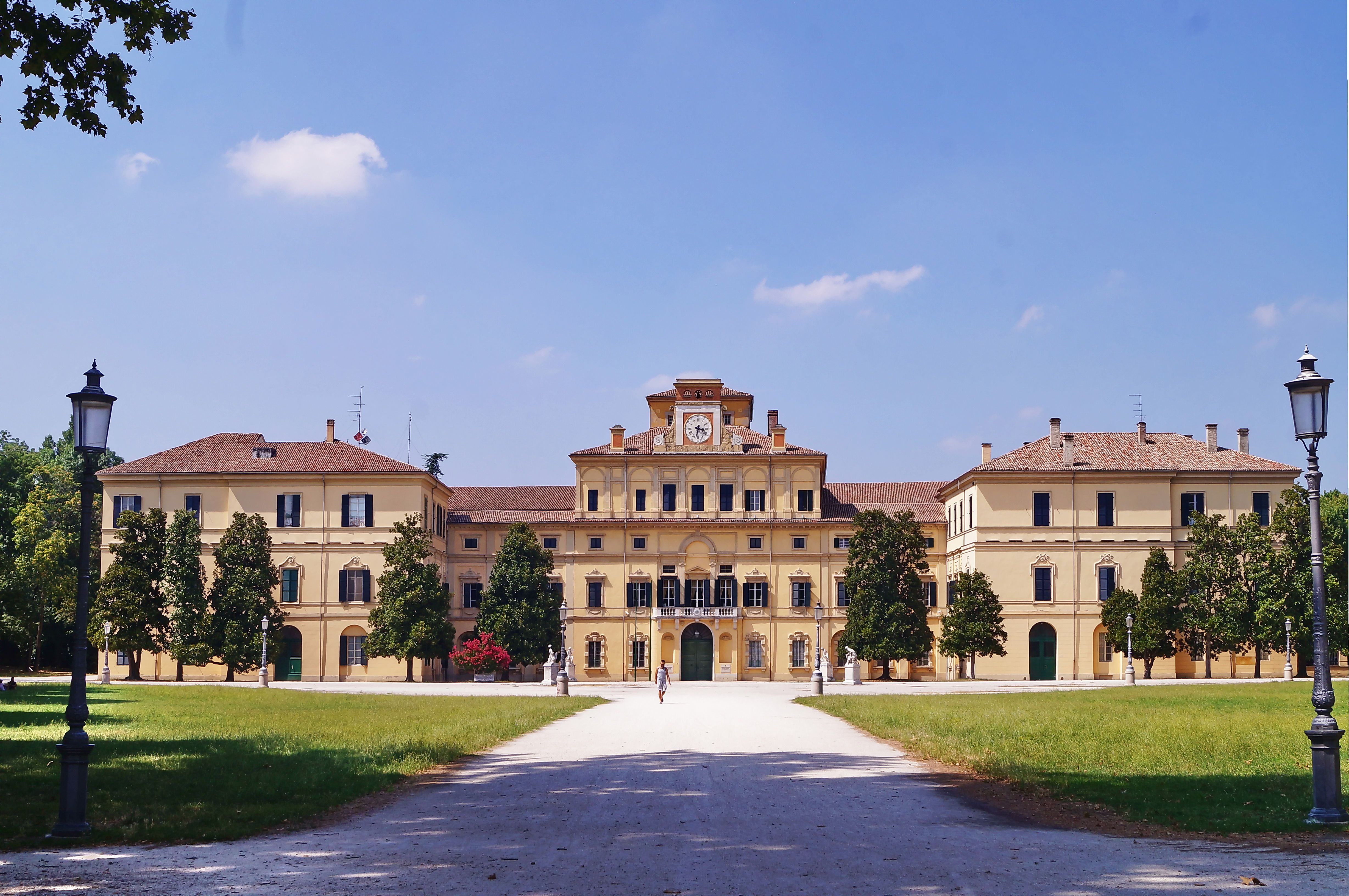 palazzo del Giardino This is a photo of a monument which is part of cultural heritage of Italy.